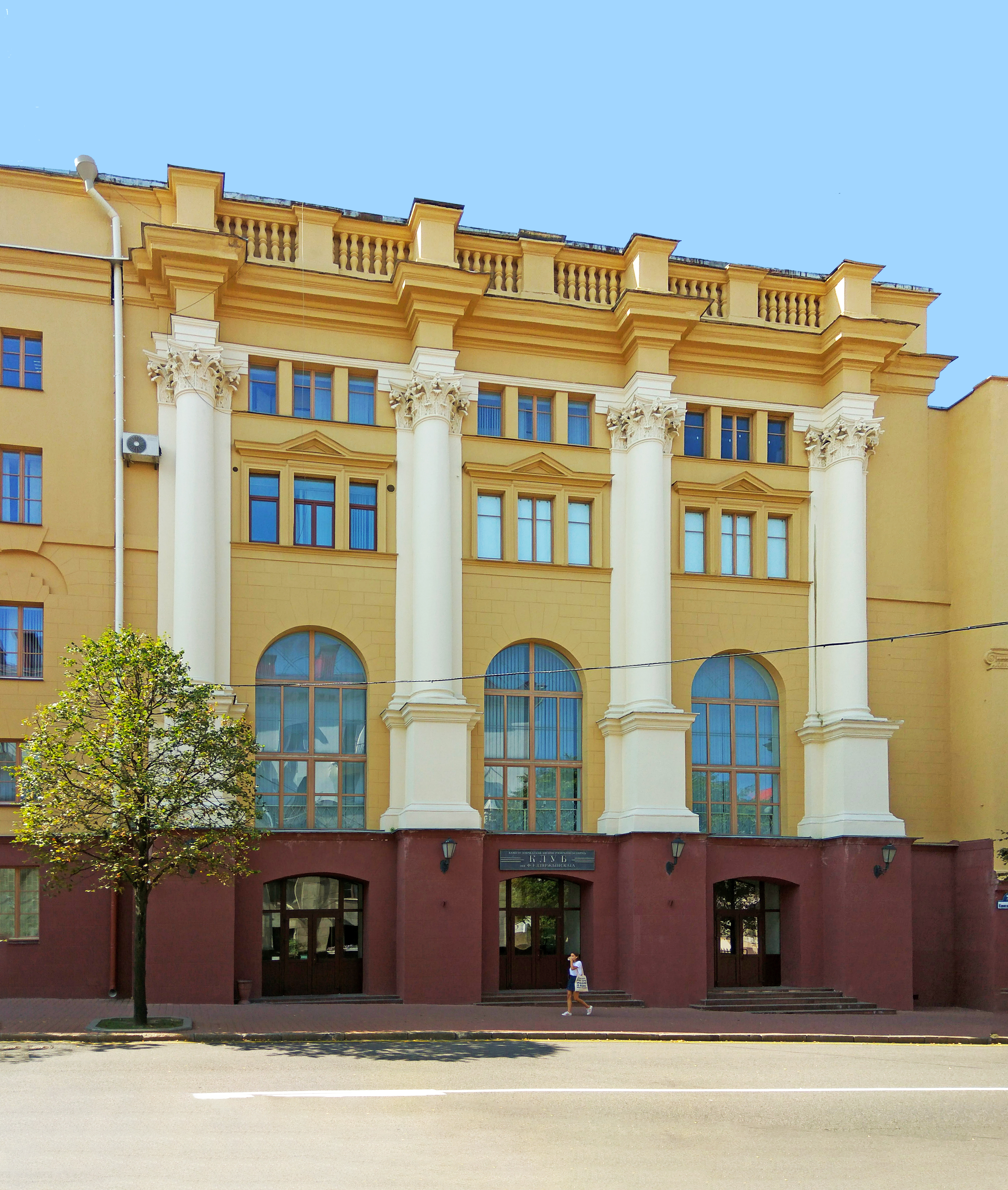 Мінск. Клуб імя Дзяржынскага